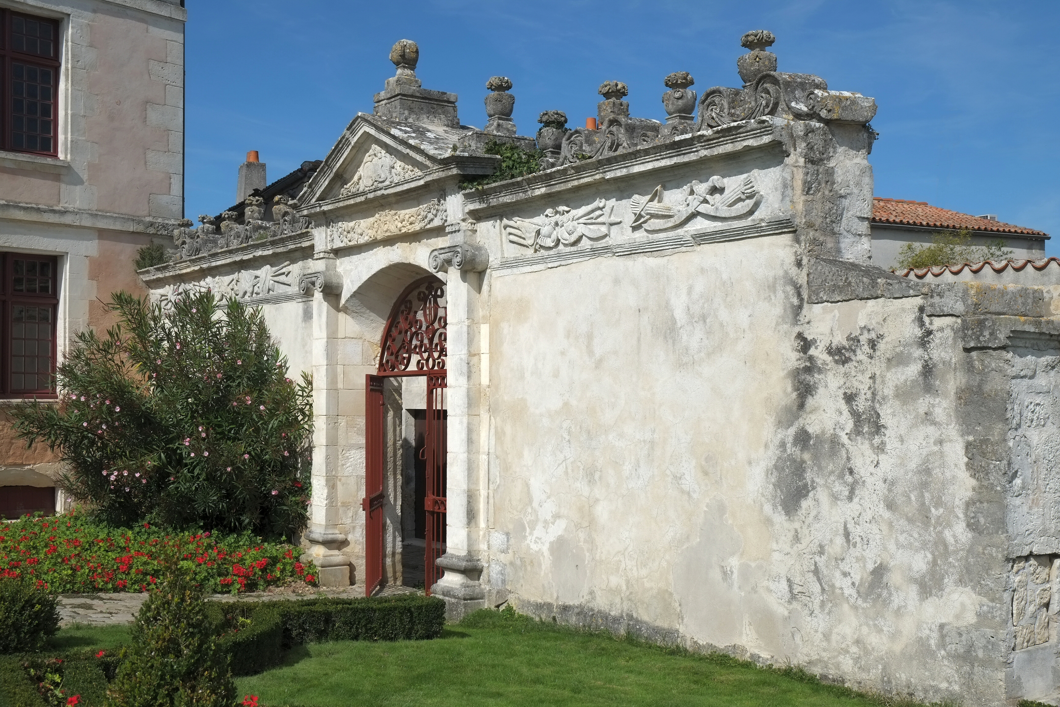 Portail de l'hôtel des Rochan Soubise Charente-Maritime France